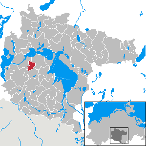 Penkow im Landkreis Müritz, Mecklenburg-Vorpommern